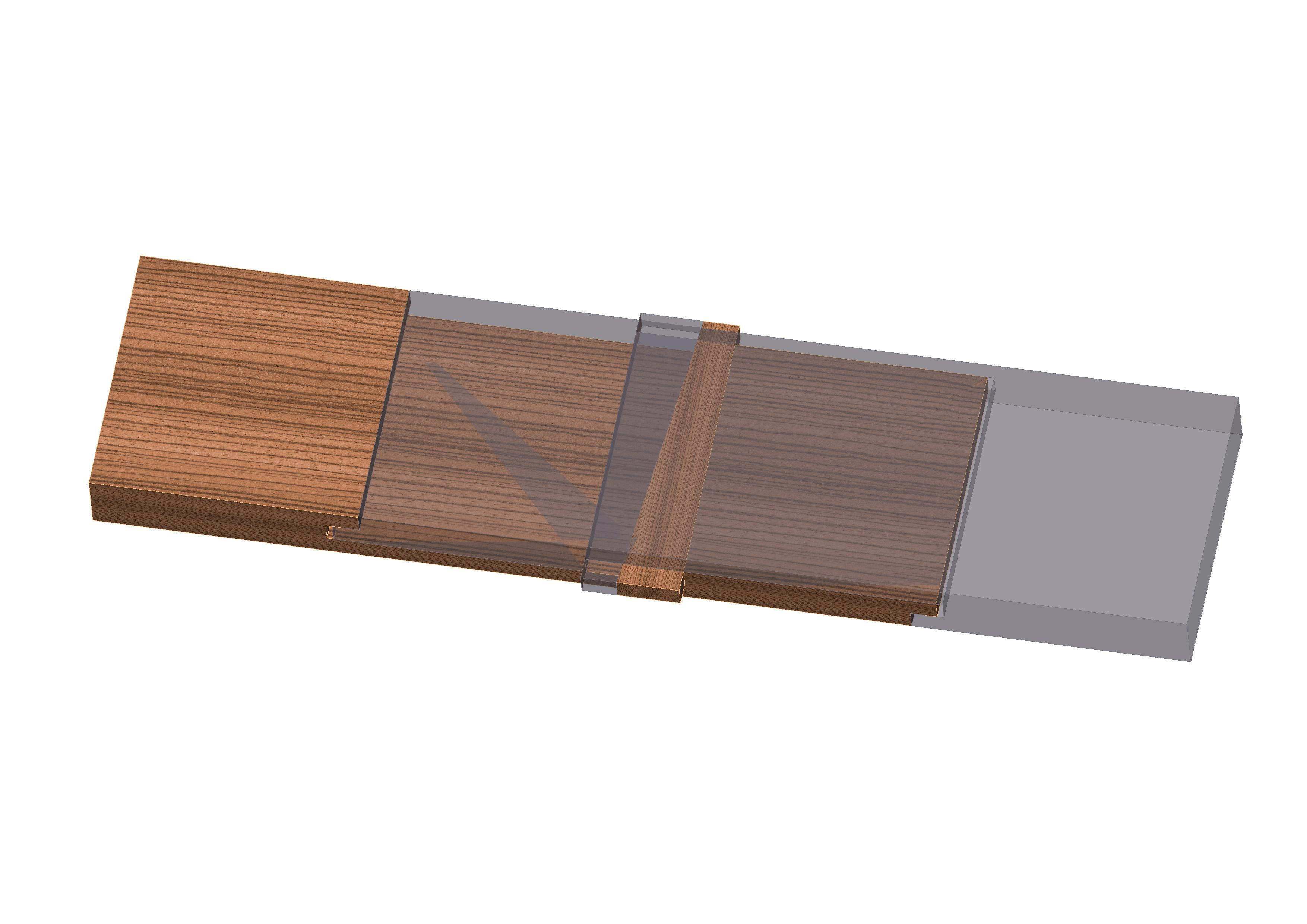 Holz-Längsverbindungen, Französischer Keil (Keilverbindungen) siehe Holzverbindung.